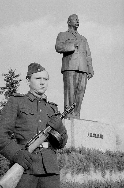 Original image description from the Deutsche FotothekAngehöriger der Kasernierten Volkspolizei mit einer PPSch-41 vor einer Statue Josef Stalins auf dem Karl-Marx-Platz anläßlich des 36. Jahrestages der Oktoberrevolution